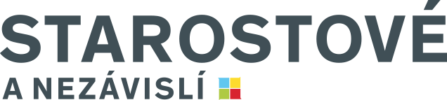 Nové logo hnutí Starostové a nezávislí, verze 2017